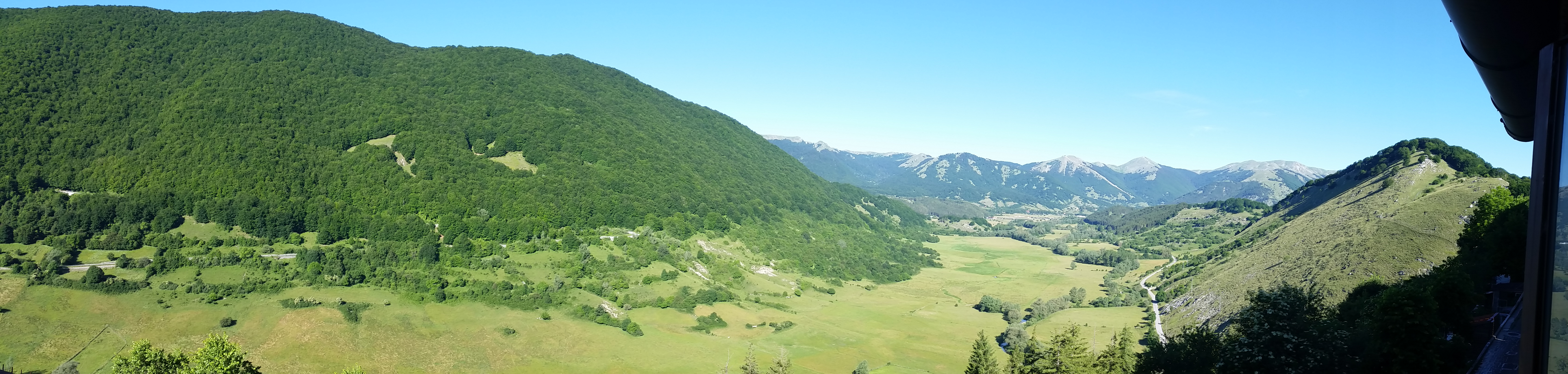 parco nazionale d'Abruzzo, Lazio e Molise (Q1438999)